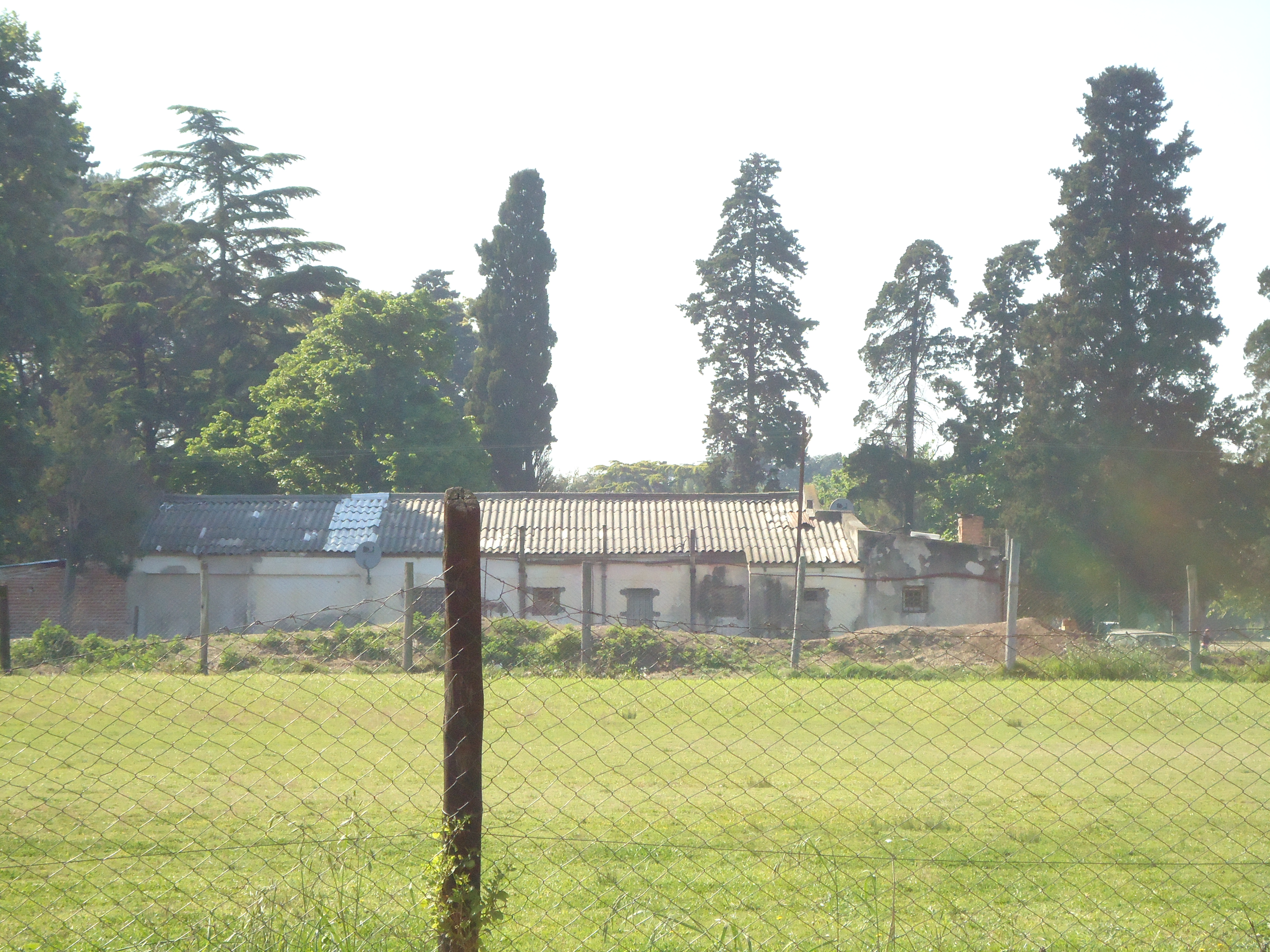 Estación Maipú (cerrada), en el Partido de Merlo, construida en el último cuarto del siglo XIX.